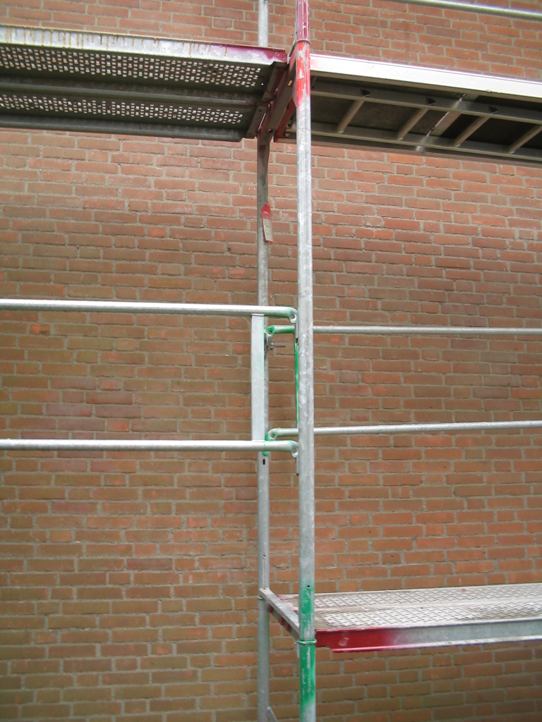 bouwsteiger / steigerpijp